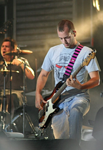 Chema, bajista del grupo El Canto del Loco